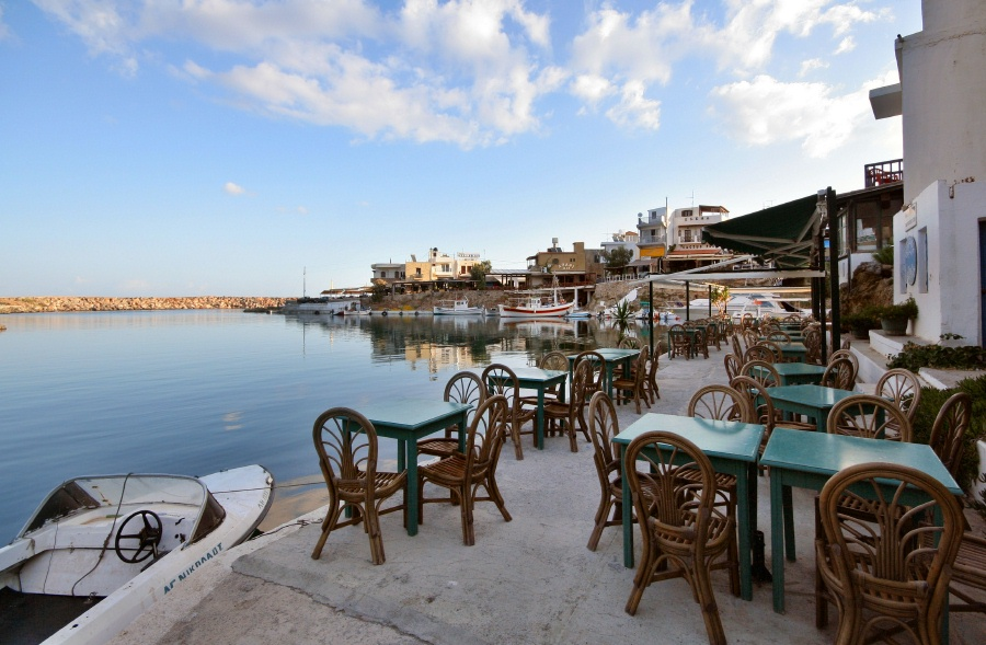 Sissi, Crete IMG_5996